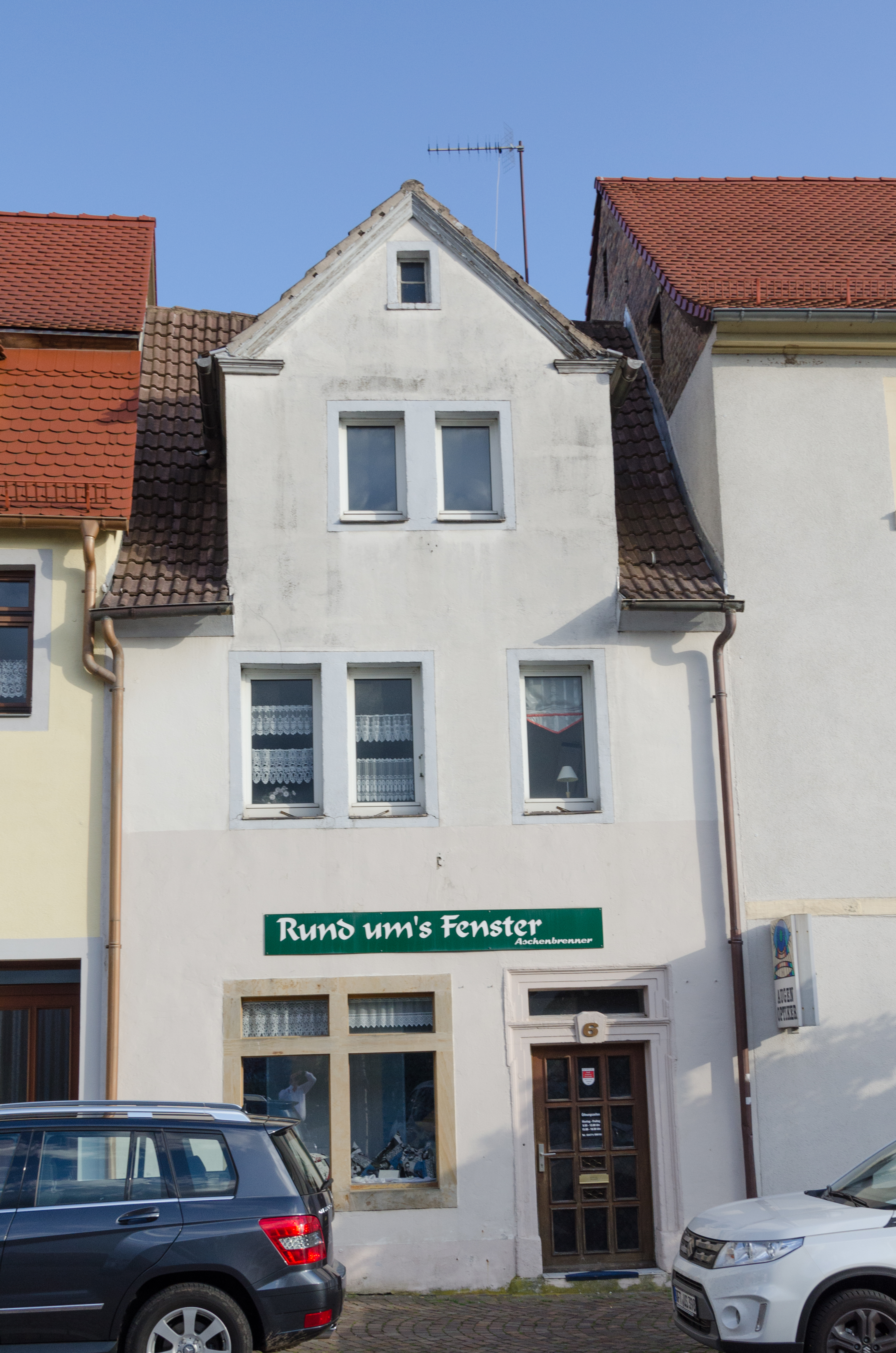 Querfurt, Klippe 6